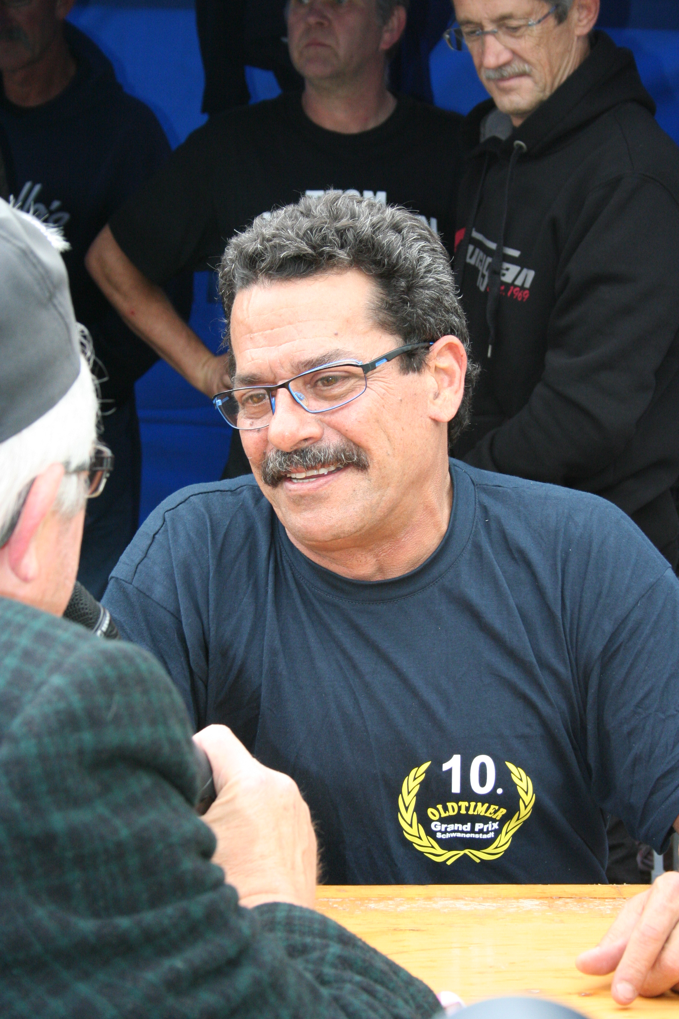 Carlos Lavado beim Oldtimer Grand Prix in Schwanenstadt, Oberösterreich, am 18. September 2016